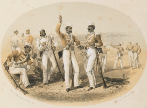 Un gruppo di Sepoys in una pausa dell'addestramento con il fucile